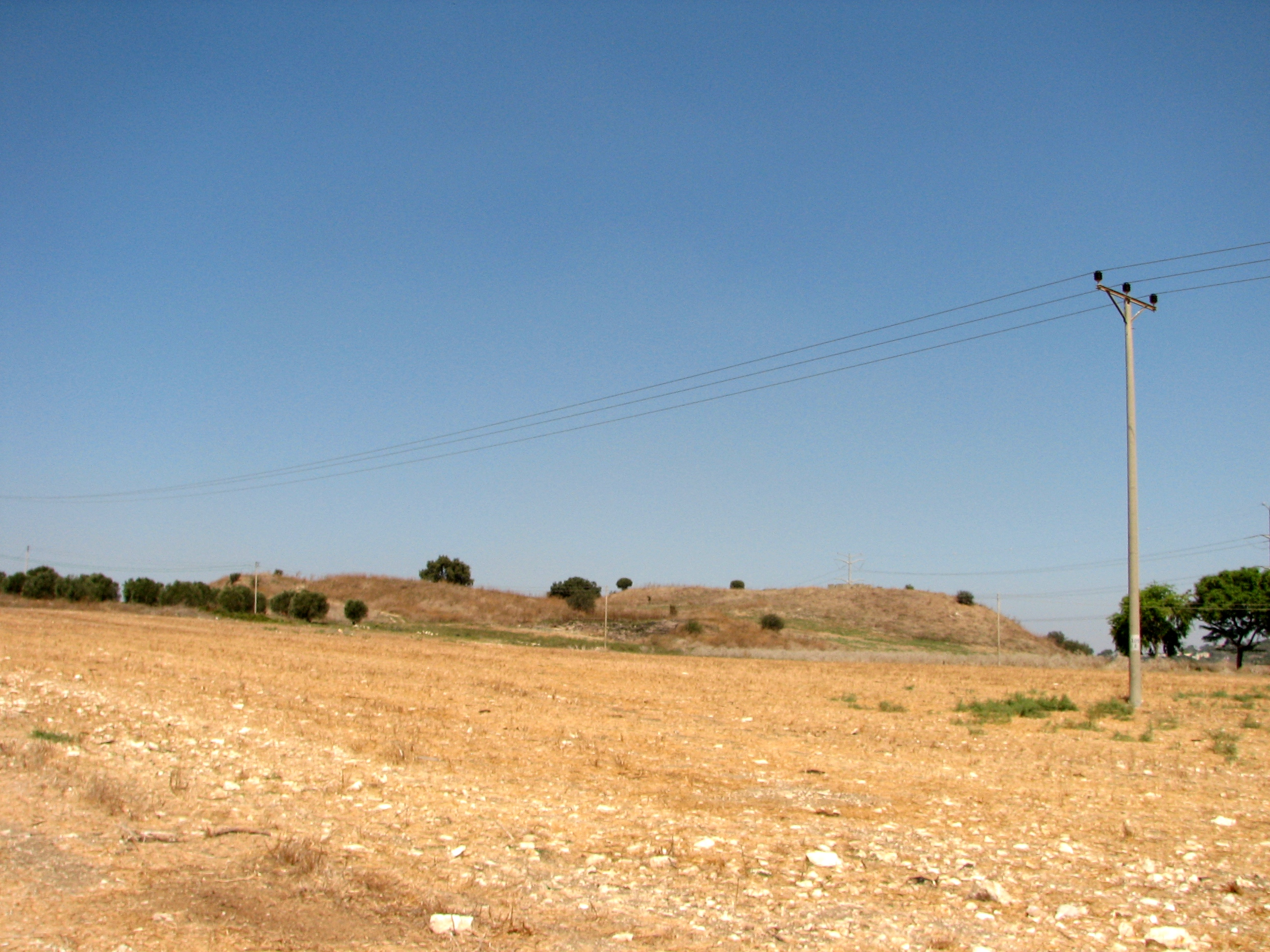 תל מעמר